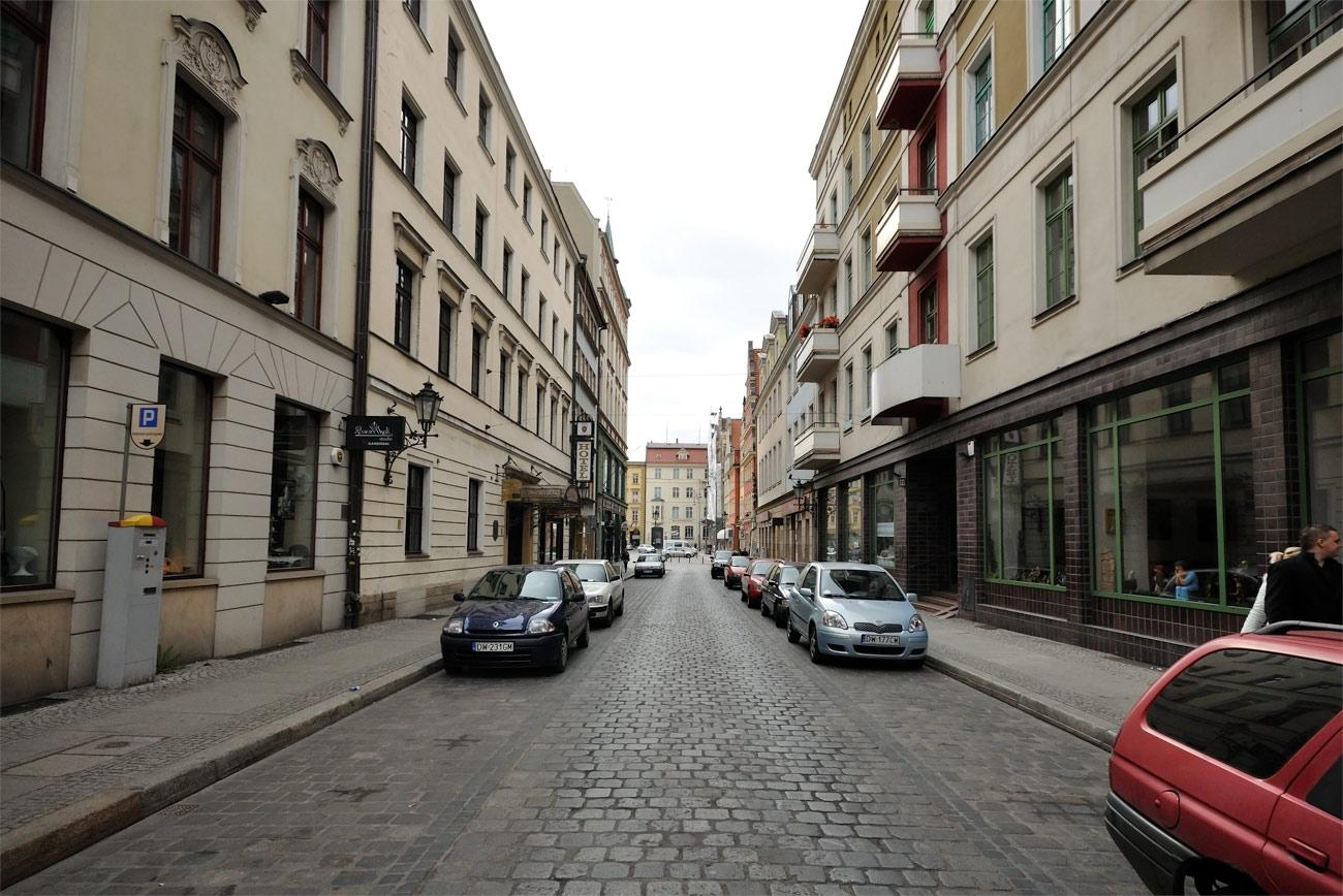 Ulica Kiełbaśnicza, widok w stronę placu Solnego.